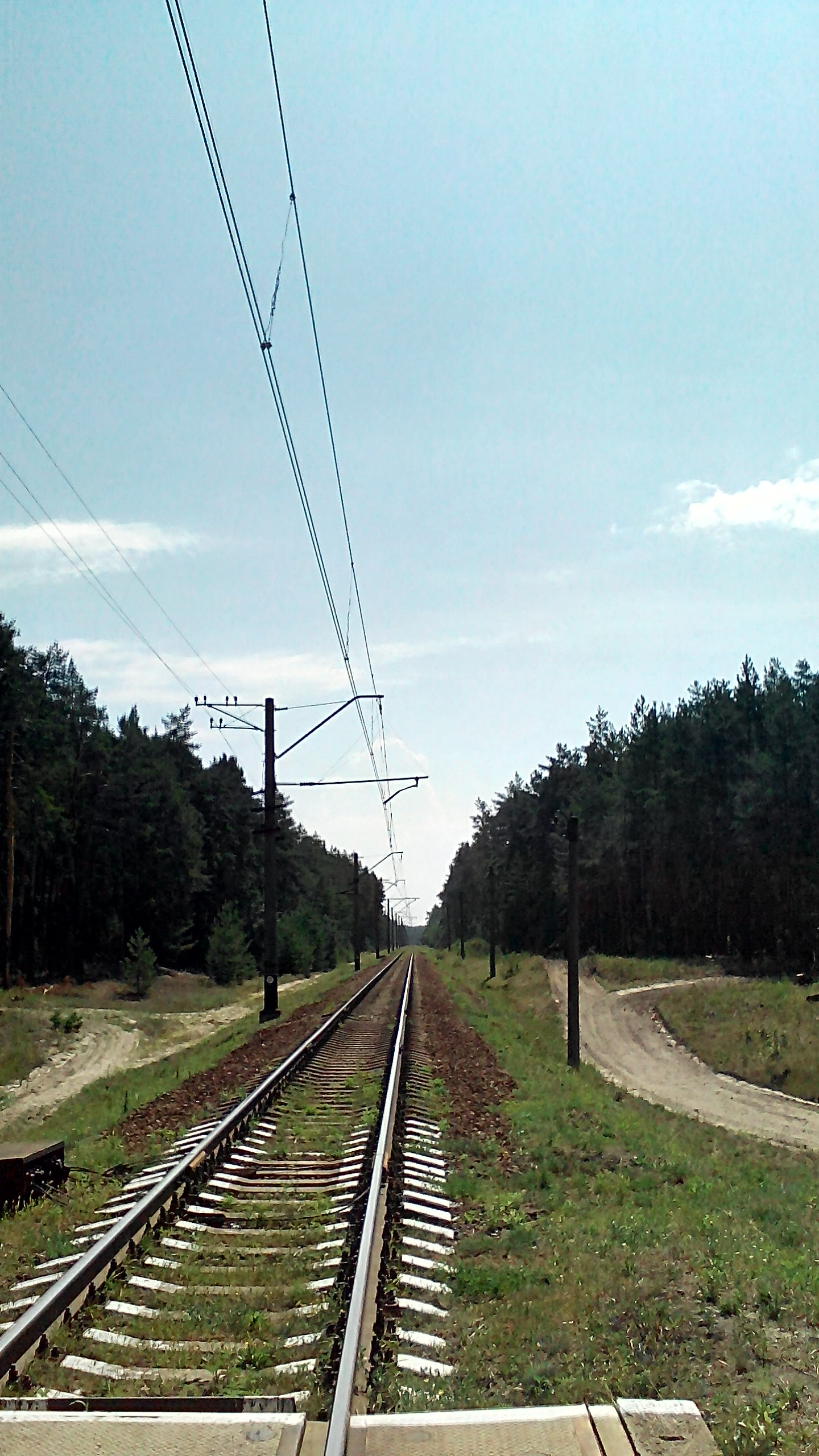 Зупинний пункт 27 км. Україна. Укрзалізниця. Південна залізниця. Ділянка Мерефа-Зміїв. Світлина колії у напрямку Змієва.